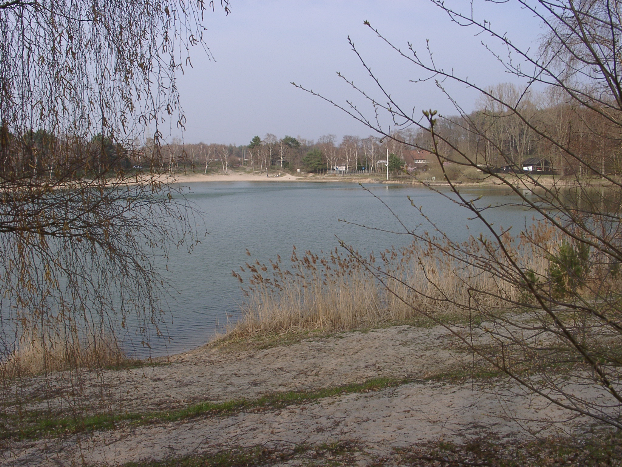 Garbsen, Blauer See. 2004-04-01